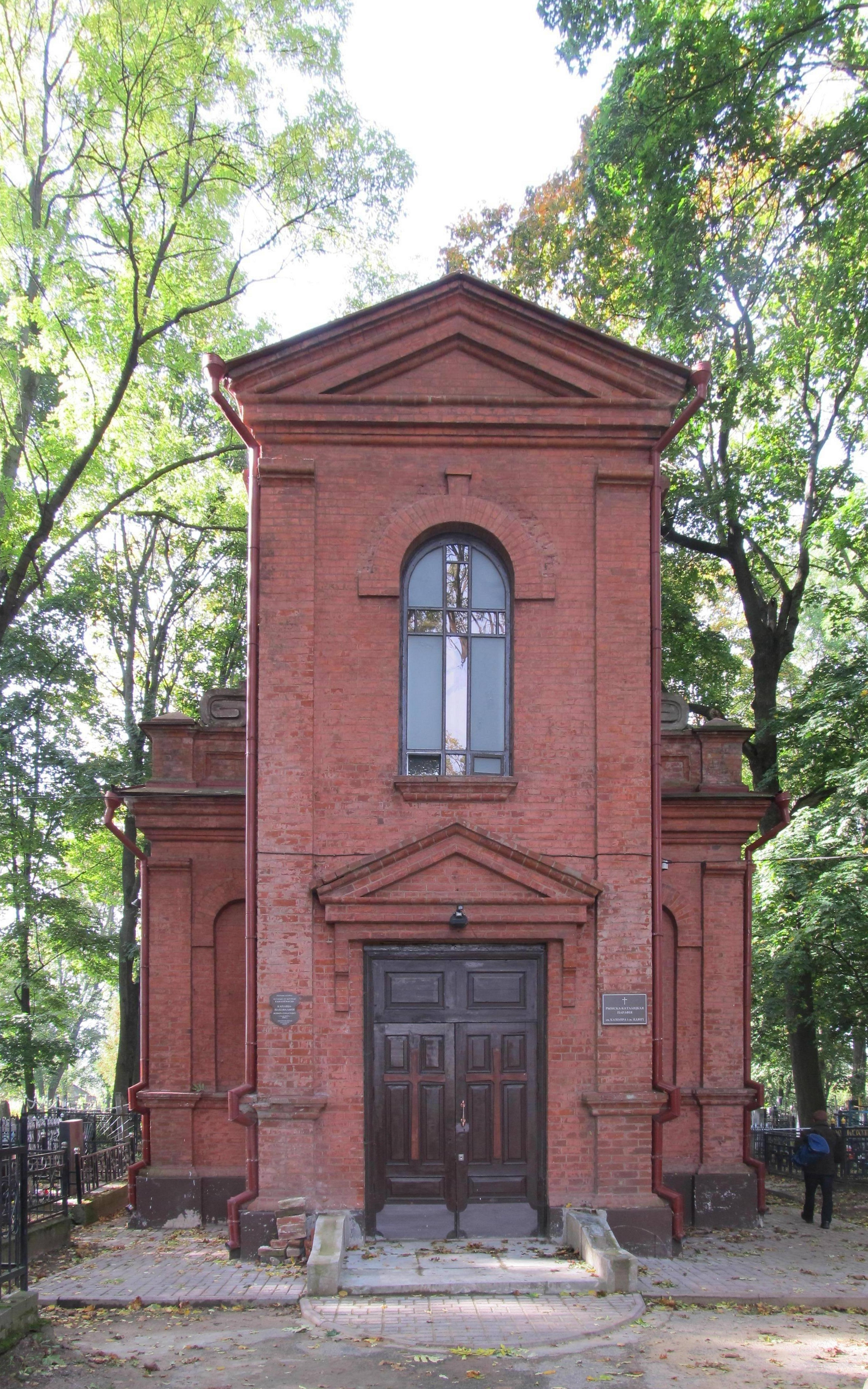 Беларуская (тарашкевіца): Капліца на каталіцкіх могілках. г. Магілёў This is a photo of Belarusian heritage monument. Reference number: 512Г00058З ( WLM)